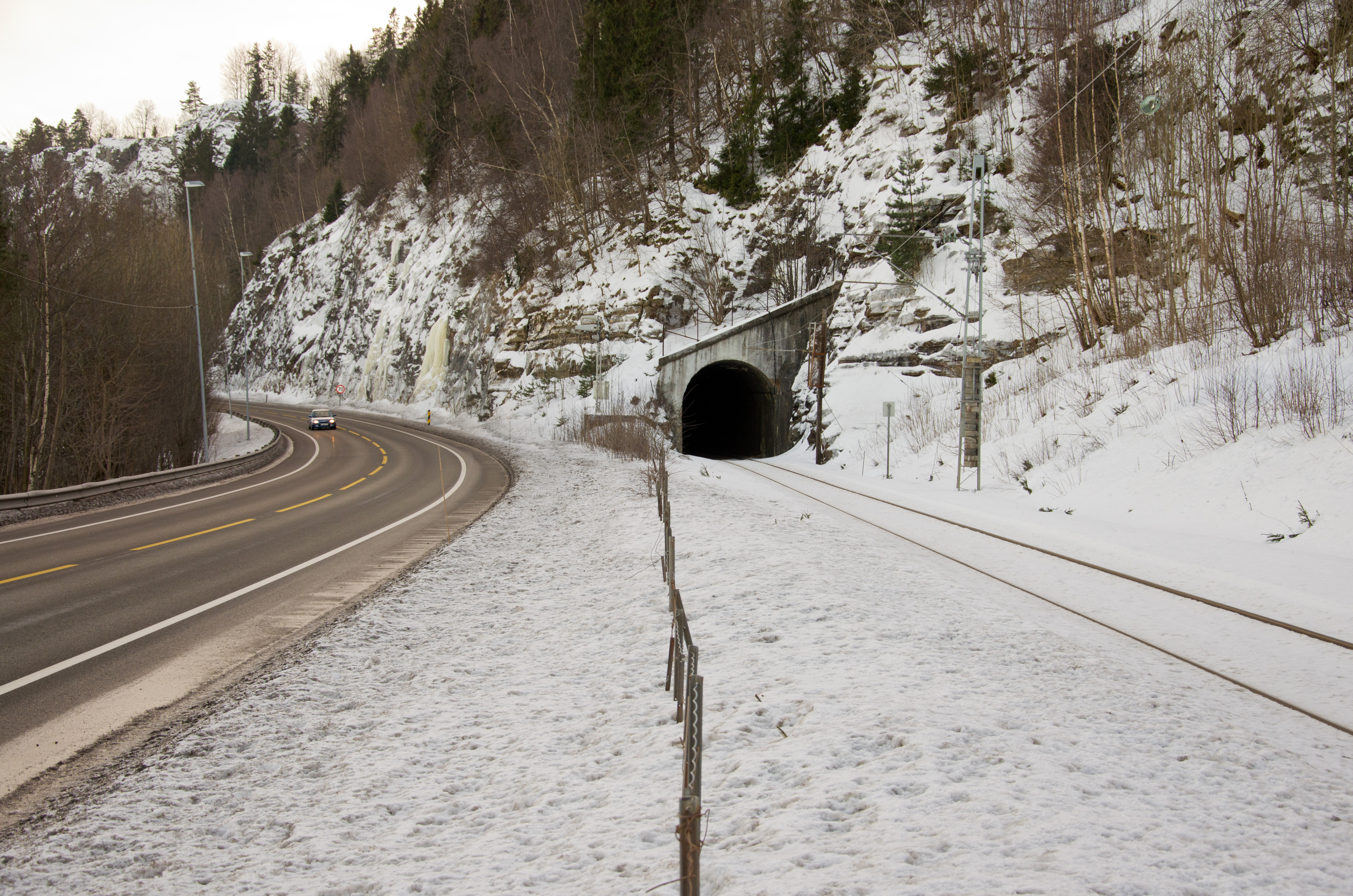 Smørstein jernbanetunnel i Holmestrand på Vestfoldbanen